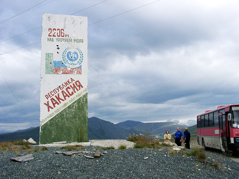 Sajanskij-Pass an der Grenze von Chakassien und Tuwa in Russland